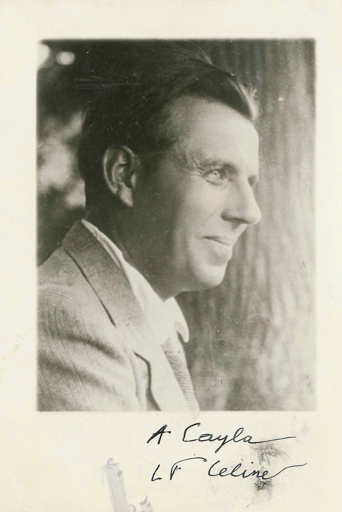 Céline photographié en buste et de profil par Henri Manuel. Au-dessous, une dédicace au libraire Robert Cayla. Photographie publiée dans le magazine Regards, 14 mai 1936 [1].